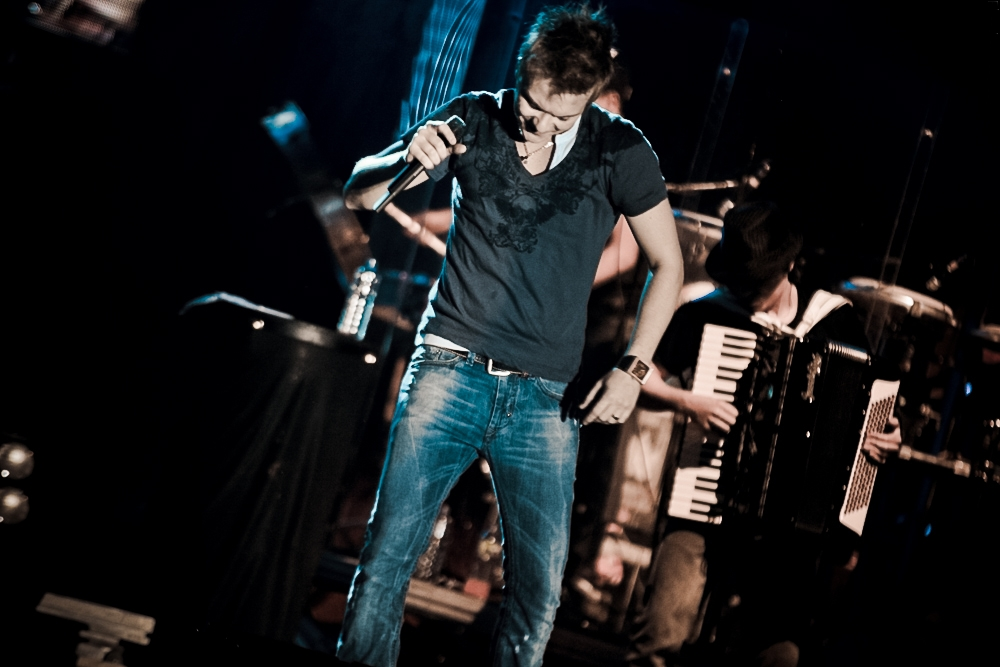 Michel durante show em Volta Redonda